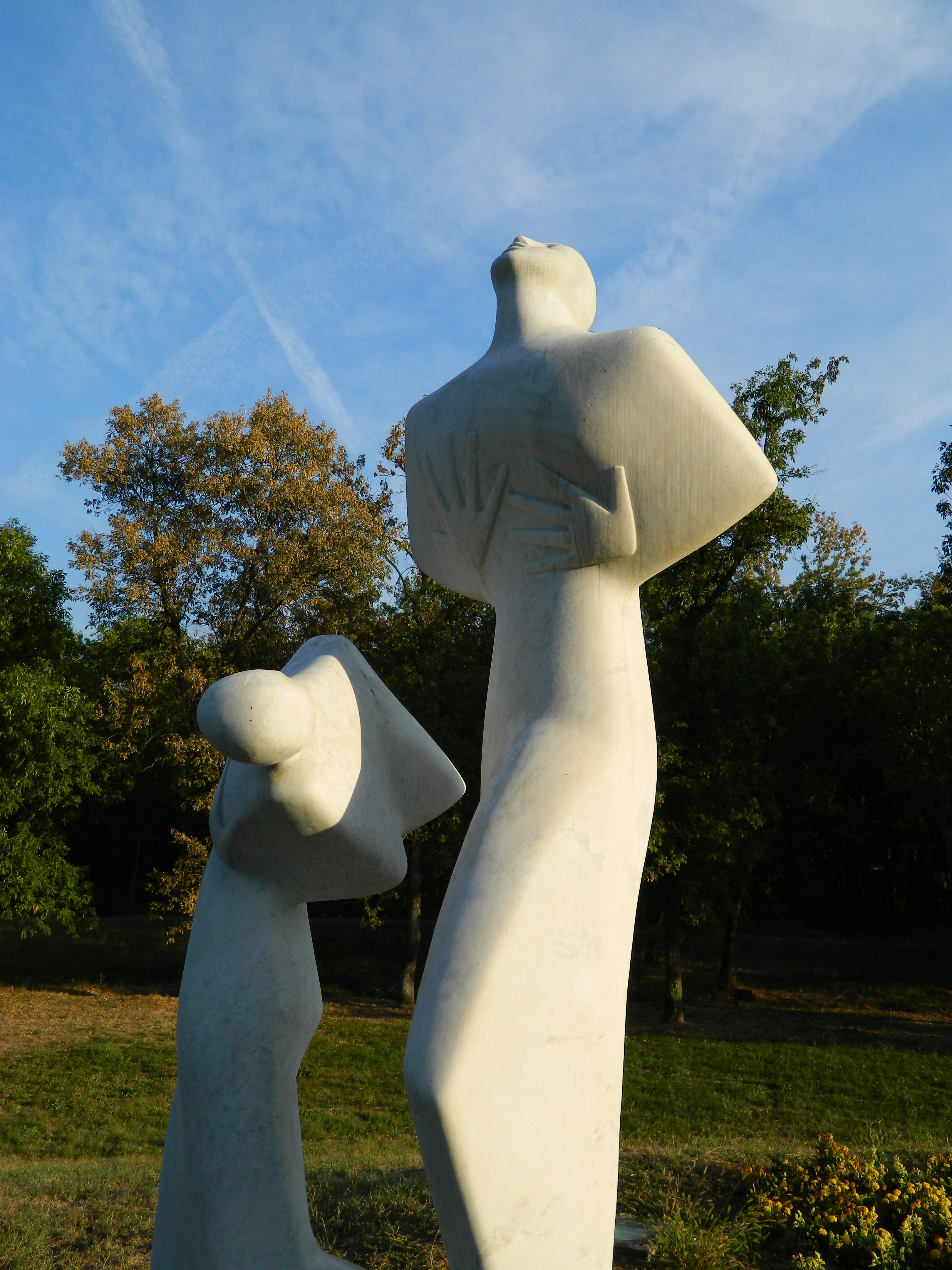 Spomen park "Kragujevački oktobar" u Kragujevcu